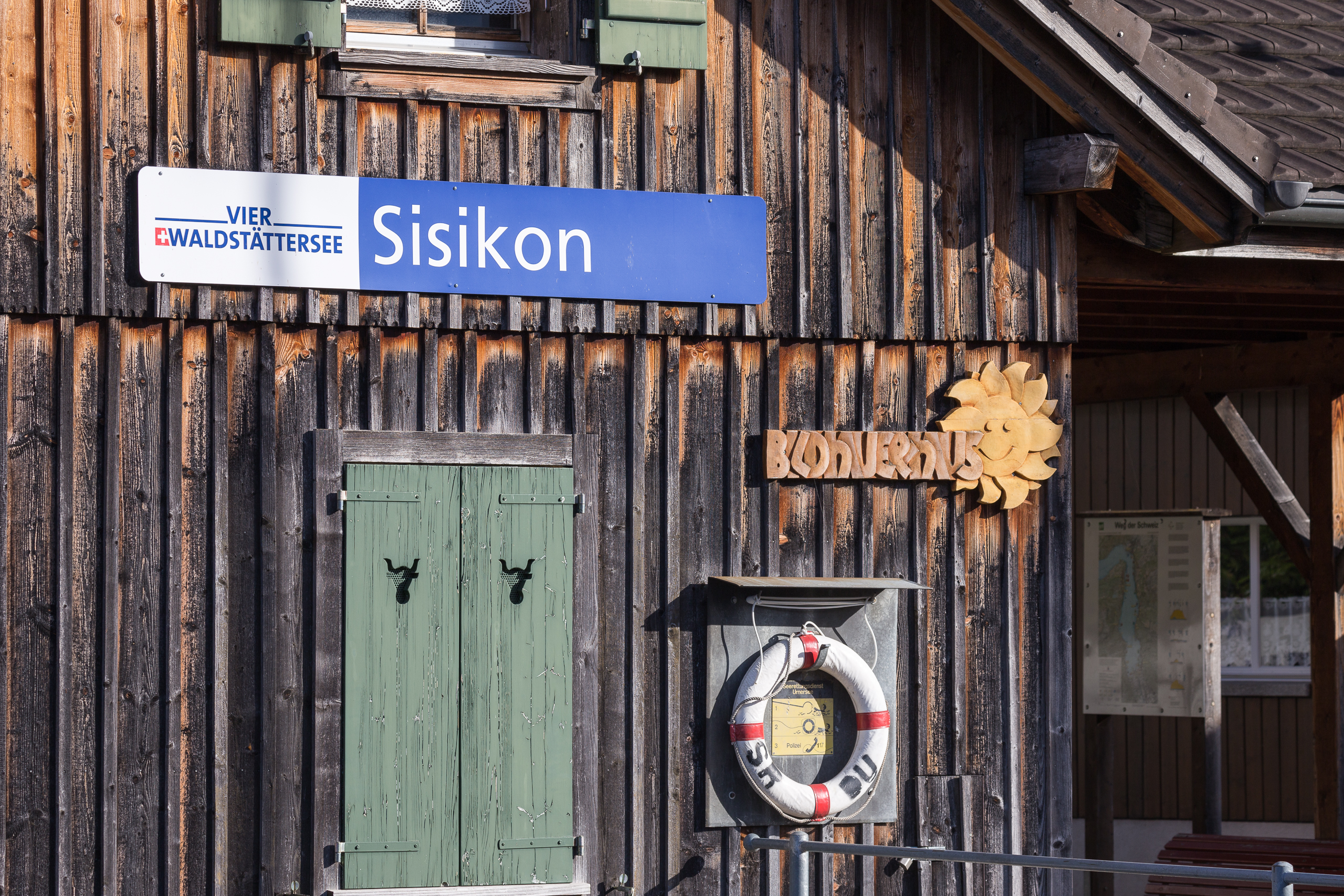 Silikon Schiffslände SGV